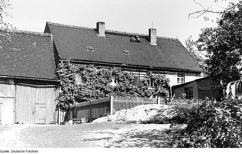 Original image description from the Deutsche Fotothek Grimma-Grechwitz. Ehem. Mühlenhaus